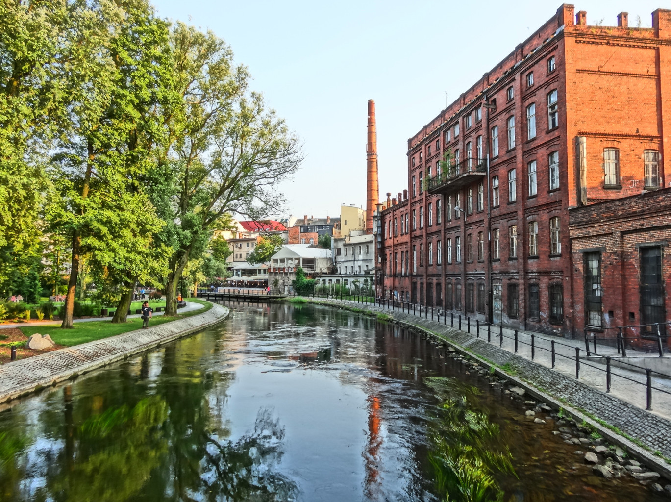 Dawna farbiarnia Wilhelma Koppa na Wyspie Młyńskiej w Bydgoszczy (przed przebudową)